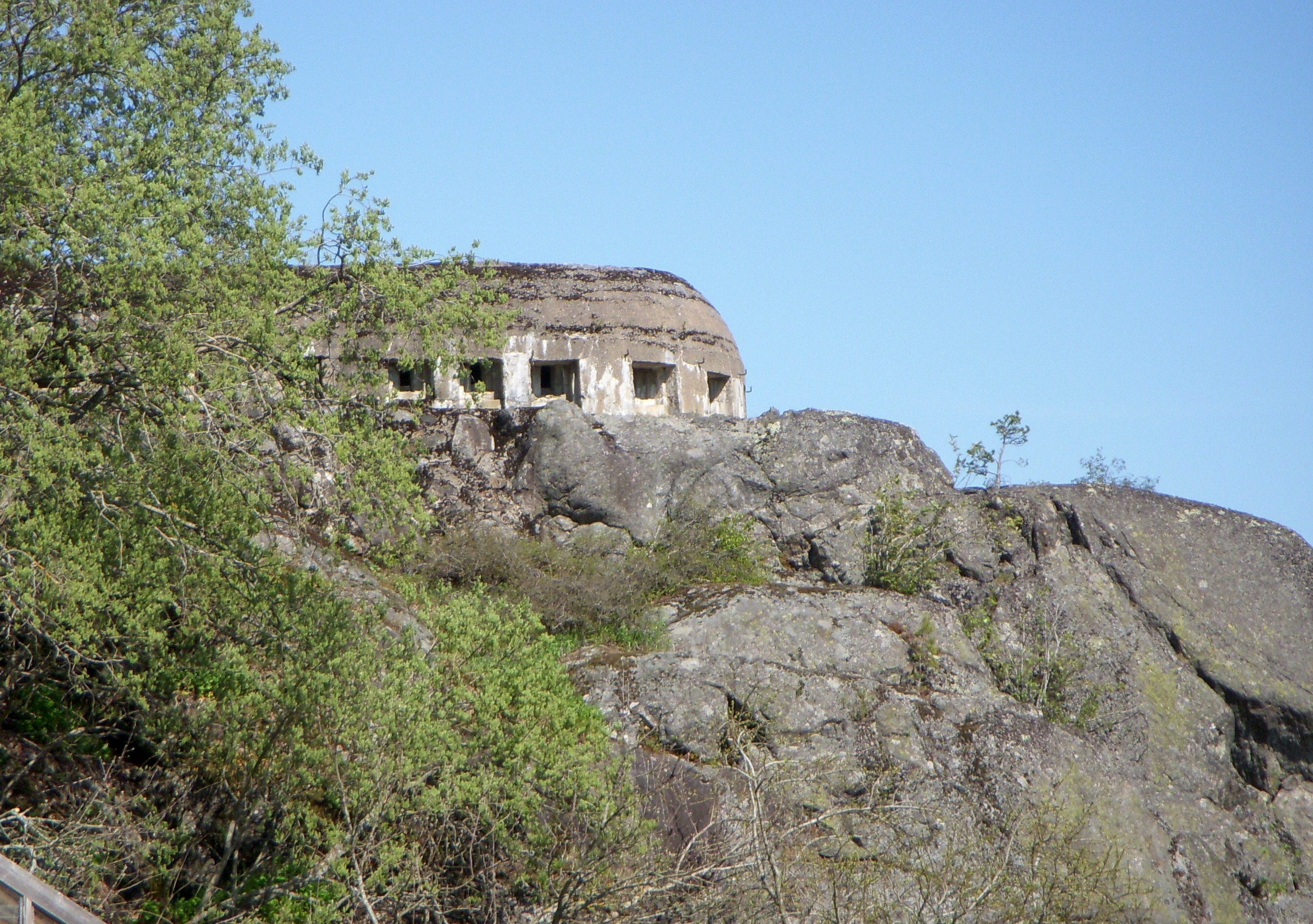 Sundbyfortet från första världskriget i Huddinge, maj 2011